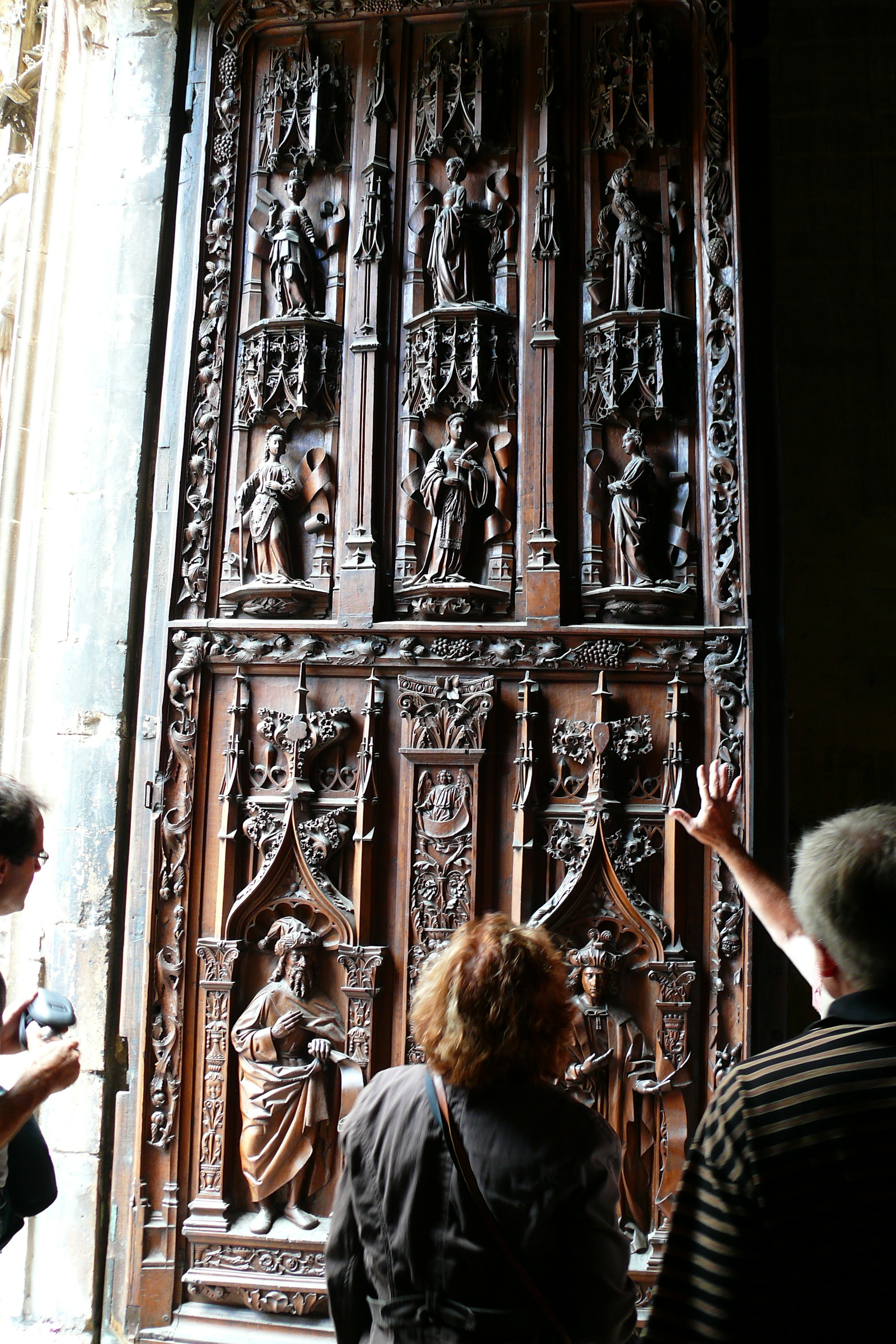 Gotische Holztüre der Kirche St.Sauveur in Aix en Provence